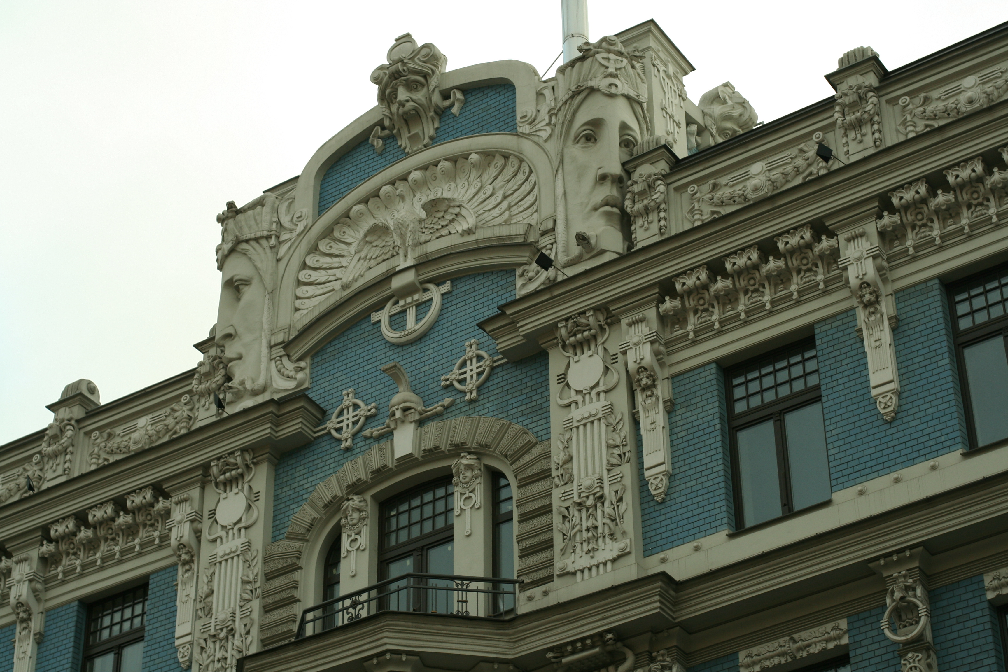 Detalle dun edificio Art Nouveau, Riga, Letonia